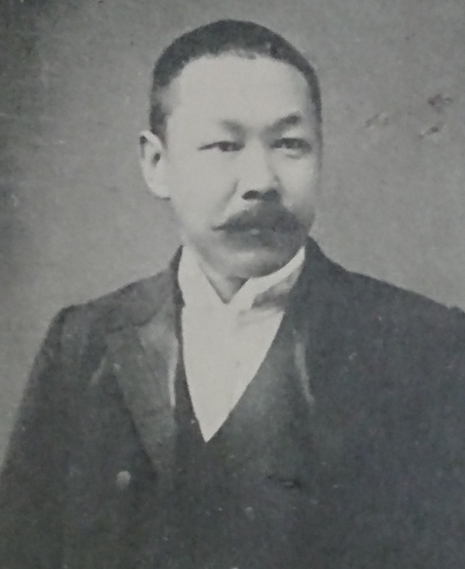 白鳥鴻彰肖像写真